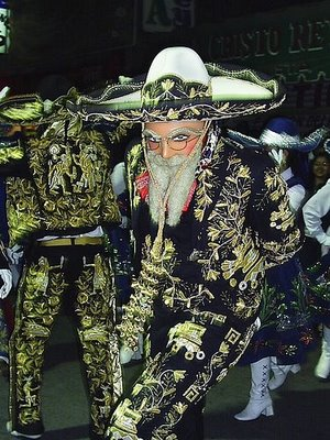 Un carnaval con futuro y uno de los más grandes.